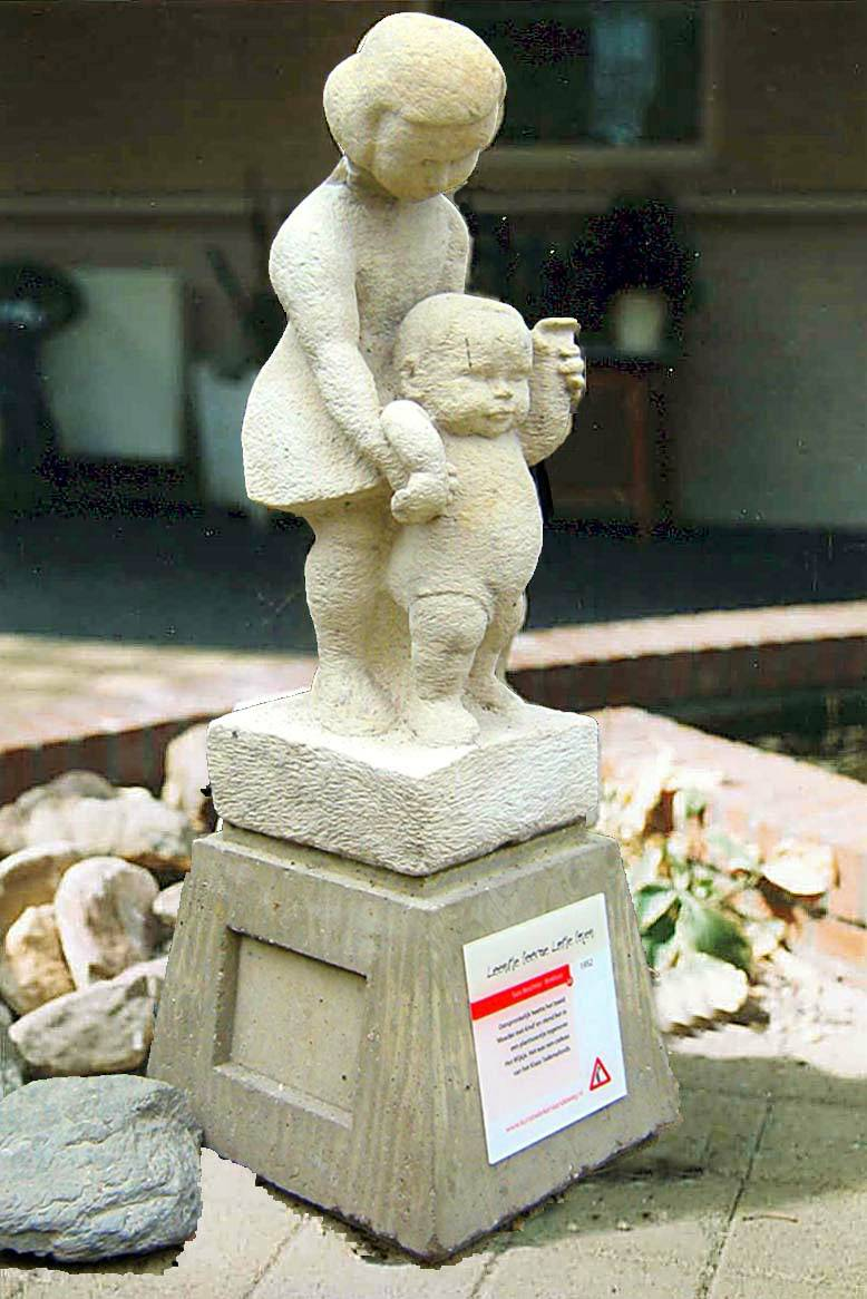 Suze Boschma-Berkhout,1952